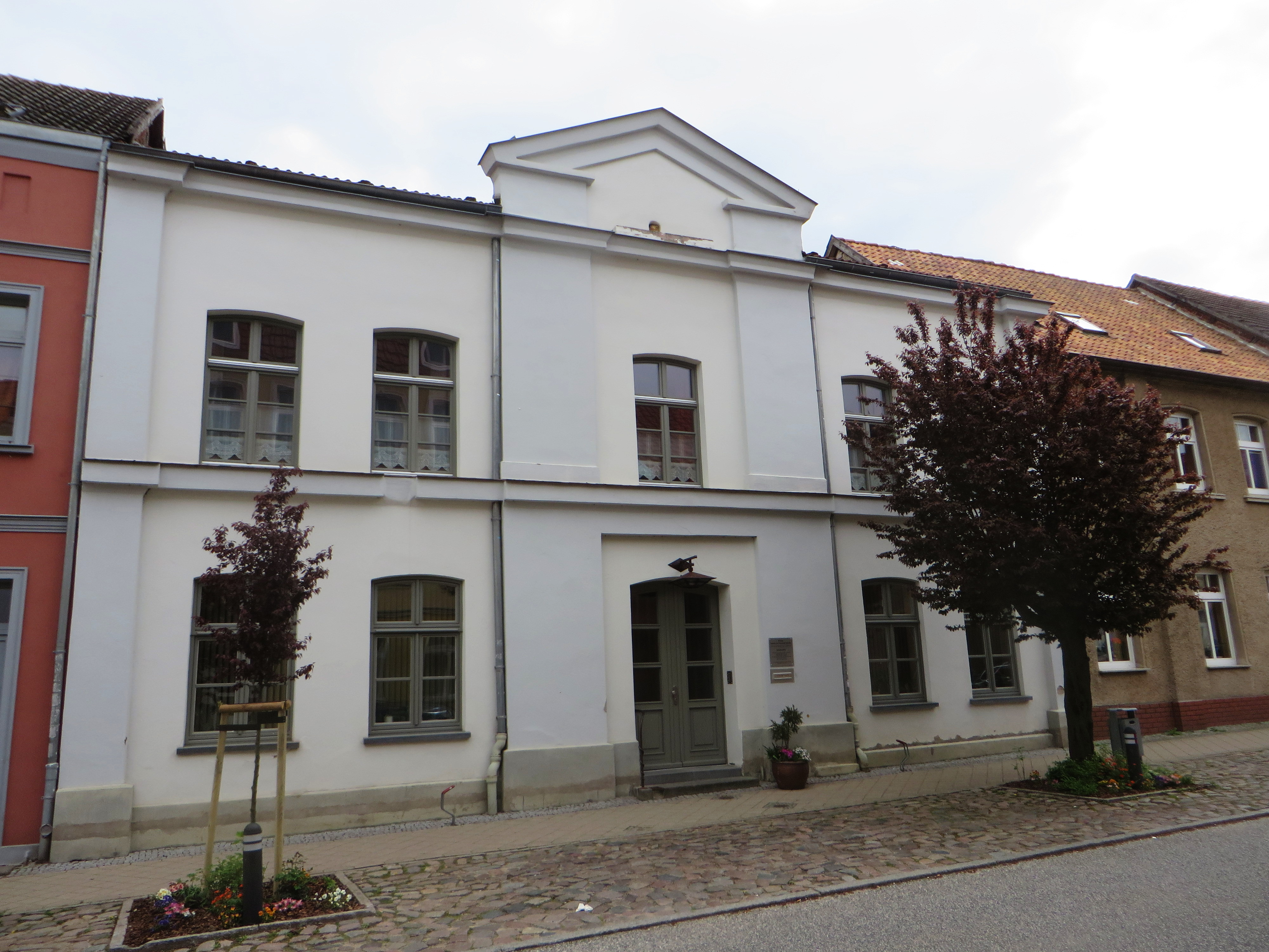 ehemaliges Amtsgericht Teterow